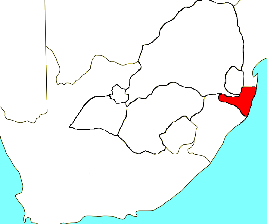 eigen kaart